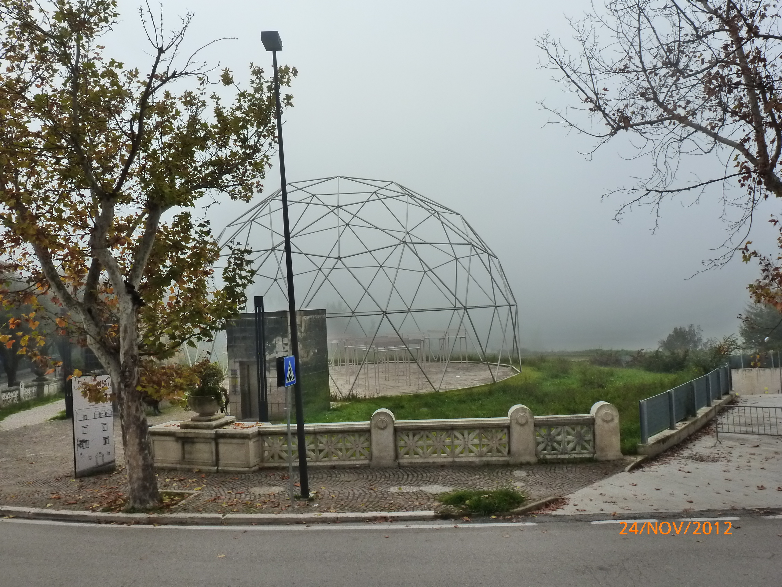 Spoletosfera di Richard Buckminster Fuller